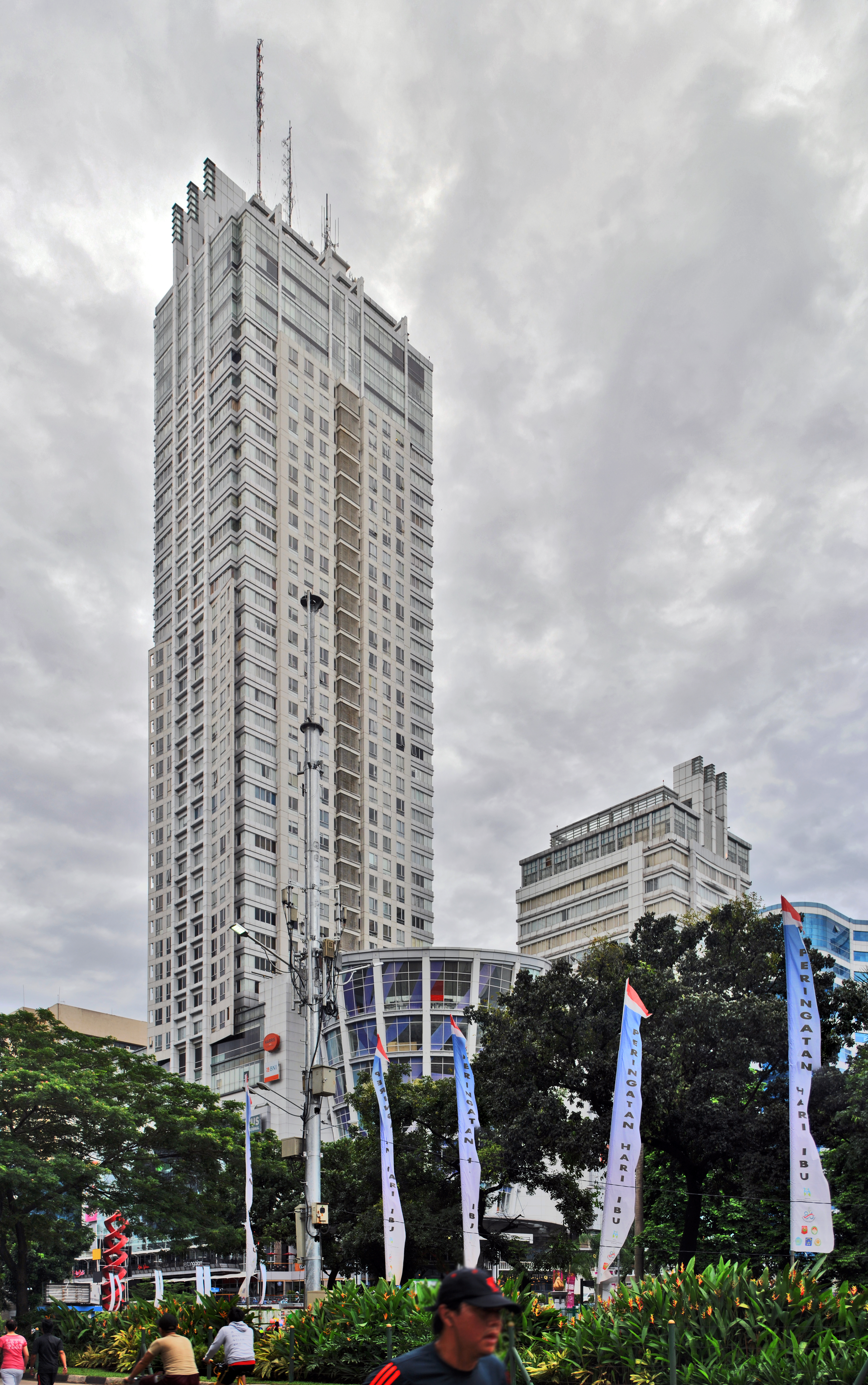 Sudirman FX